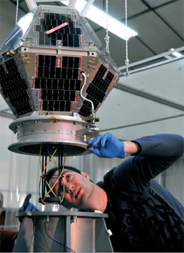 Técnico chequeando el satélite.